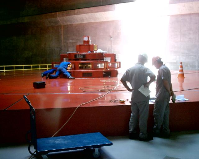 Foto tirada em 05/04/2003 na usina hidrelétrica de Foz do Areia no Paraná. Gerador em manutenção.